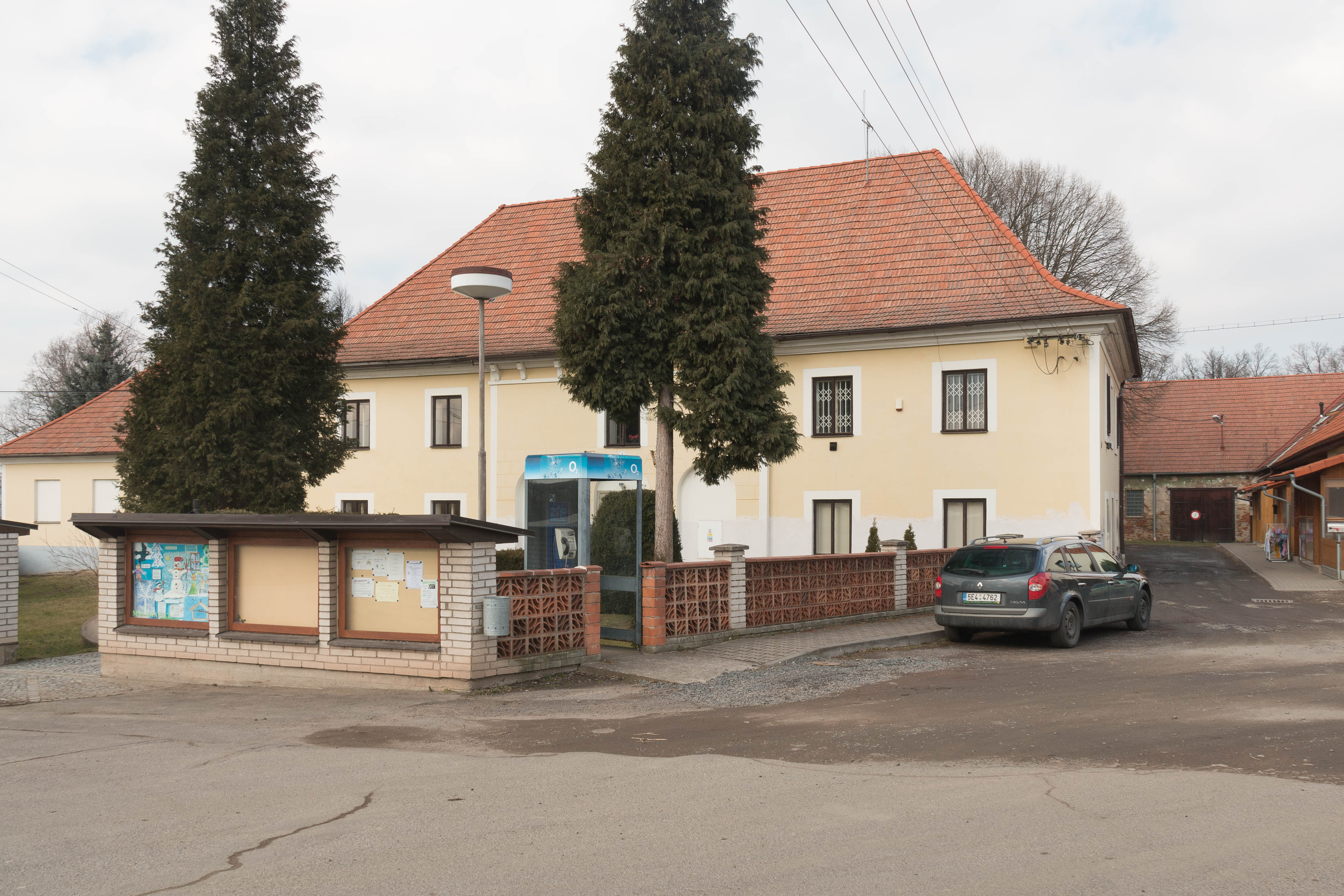 Lukavice u Slatiňan obecní úřad